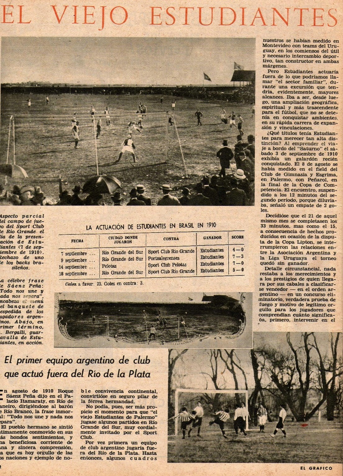 Chronicle of the Estudiantes de Buenos Aires tour to Brazil in 1910.